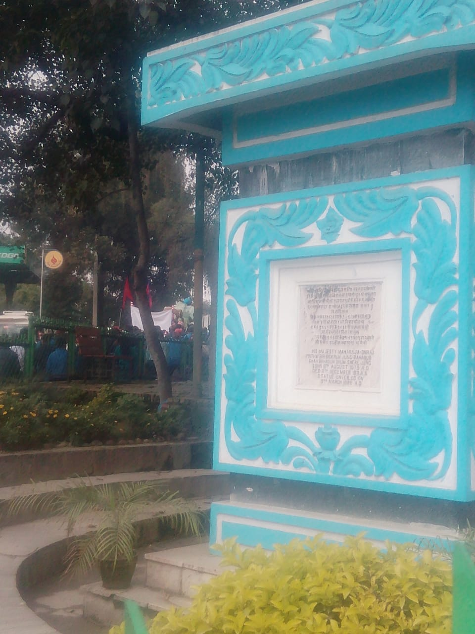 नेपाली: सिंह दरबार अगाडी भद्रकालीमा रहेको महाराजा पृथ्वी वीर बिक्रमको शालिकको शिलालेख